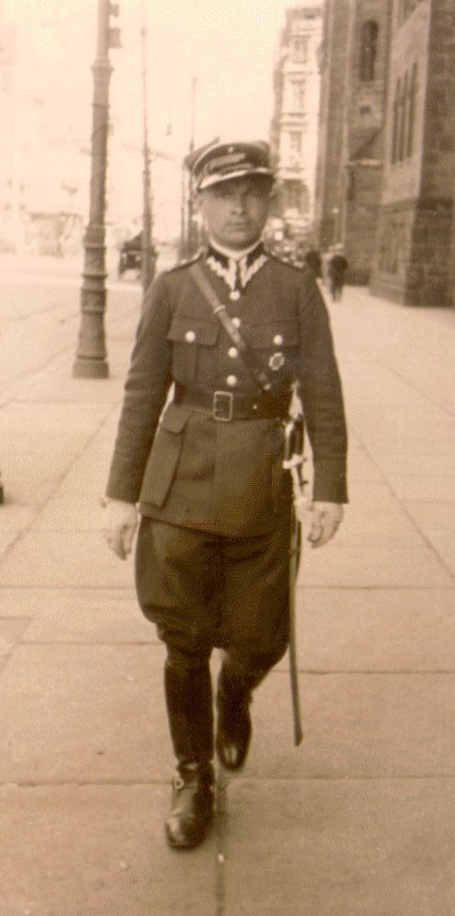 Antoni Rychel w mundurze podporucznika r. 1932